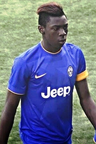 Accademia del Calcio "Adolfo De Cecco" a Poggio degli Ulivi, Città Sant'Angelo (PE). Il calciatore italiano Moise Bioty Kean in azione nelle giovanili della Juventus, nel corso della vittoriosa sfida contro il Monteruscello (5-0) valevole per la Nike Premier Cup 2015.